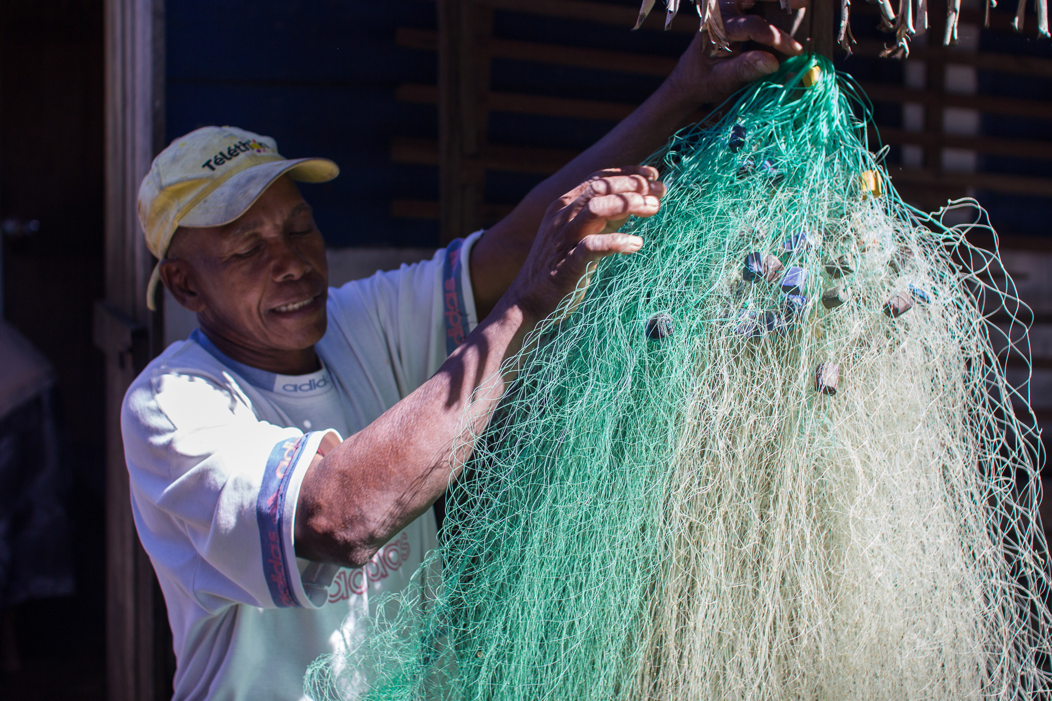 Pêcheur de retour de la mer suspendant ses filets. This is an image of "African people at work" from Madagascar